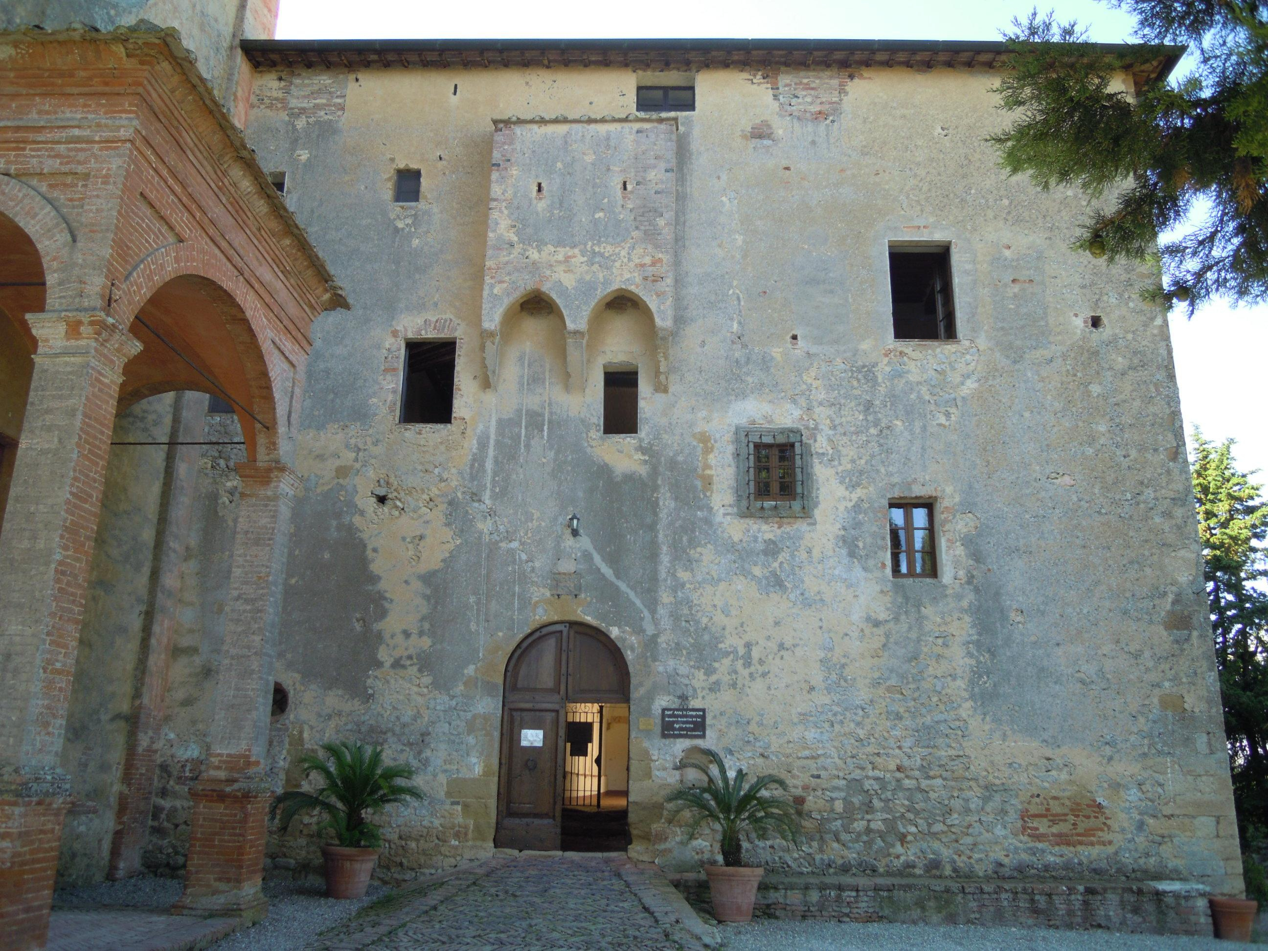 La facciata del monastero di Sant'Anna in Camprena